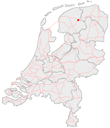 Knooppunt Drachten of Knooppunt Ureterpervallaat of Aansluting Drachten.